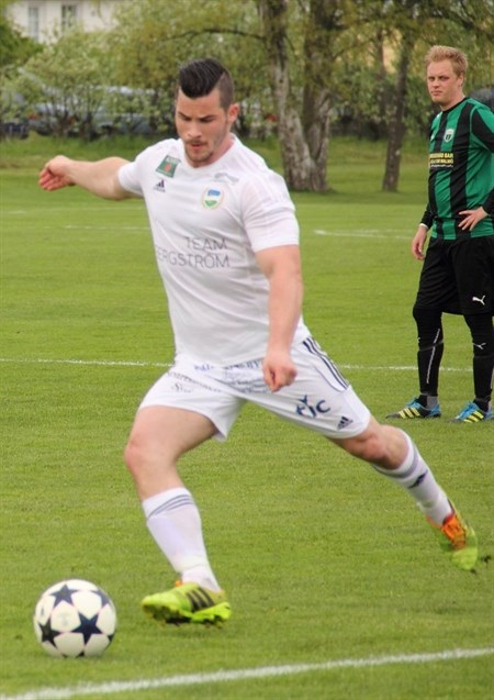 Nichlas Schön